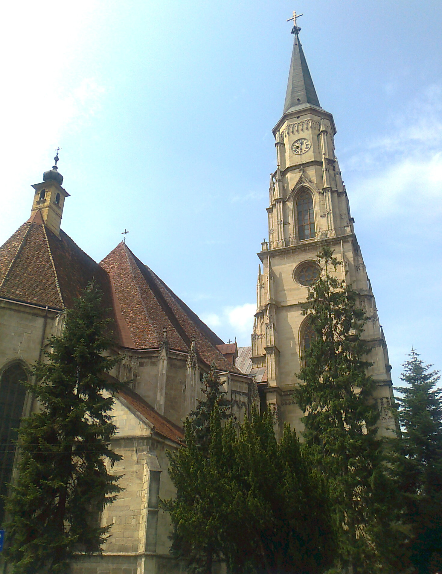 Szent Mihály-templom (Kolozsvár)